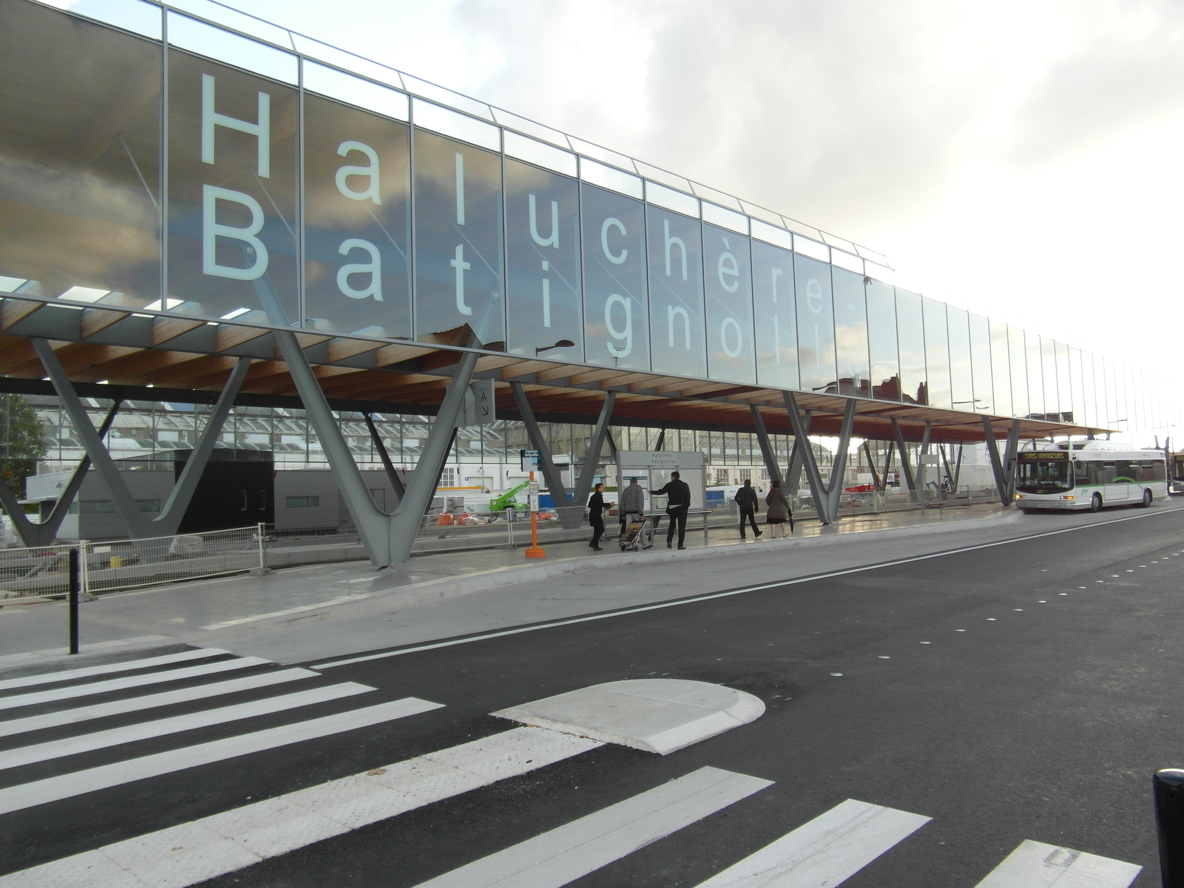 Pôle d'échanges en construction (2012)